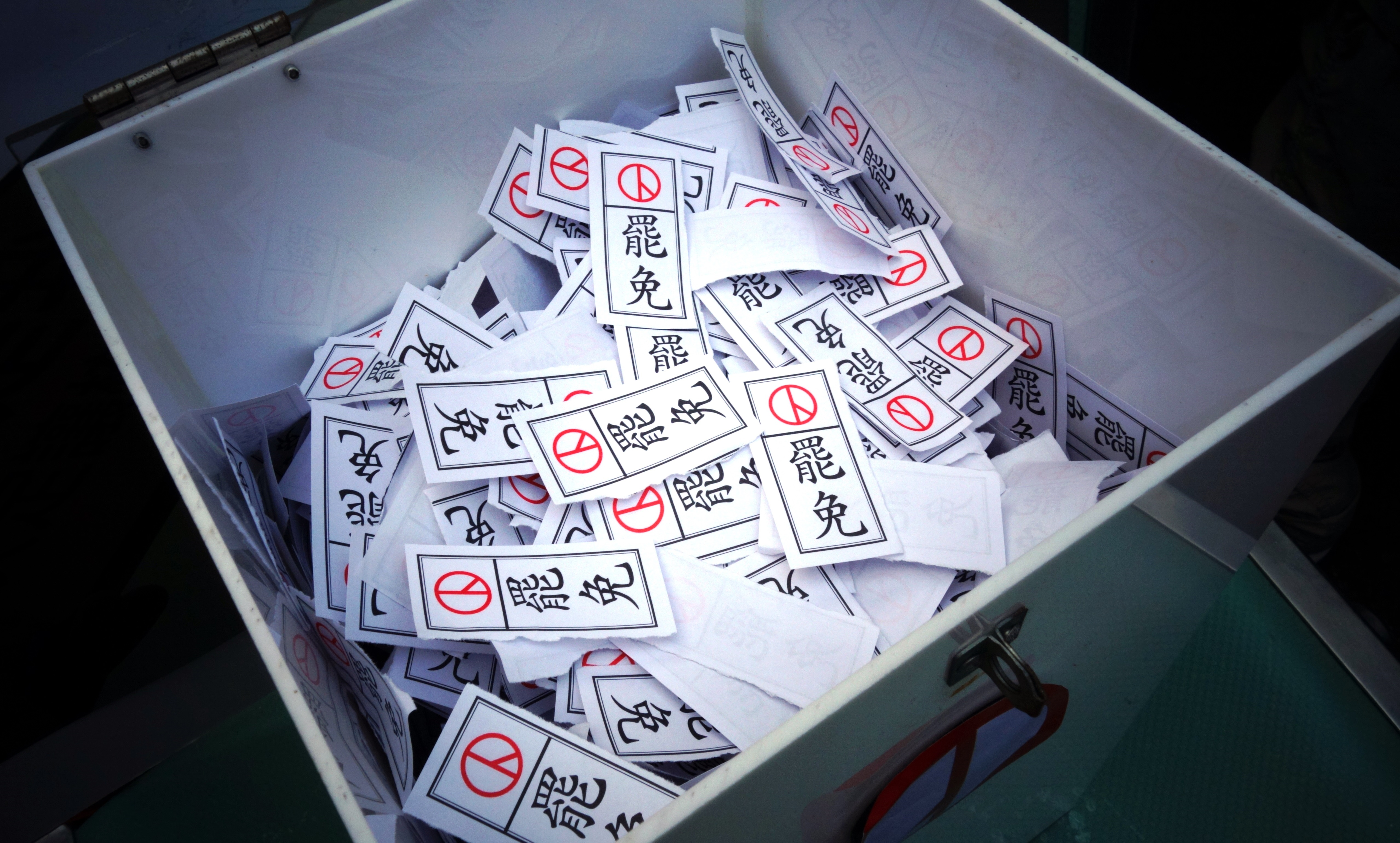 2013.3.9反核行動劇抨擊中國國民黨立委